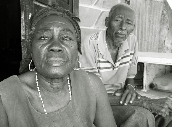 Haiti Old people. Je suis l'auteur de cette photo (André Perron) / Own Work